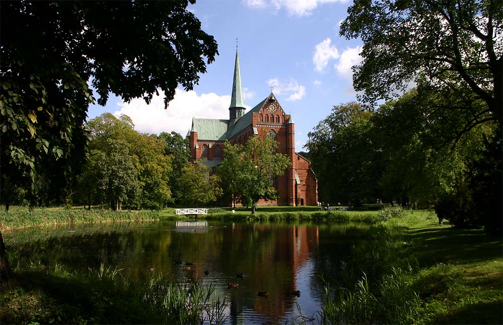 Bad Doberaner Münster fotografiert von: Softeis